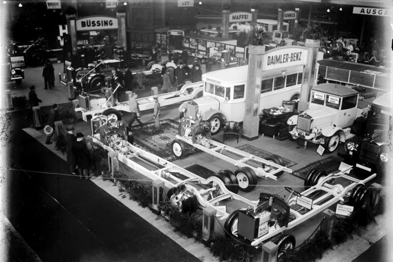 Die Eröffnung der Internationalen Automobilausstellung in den Ausstellungshallen am Kaiserdamm in Berlin! Blick auf den Daimler-Benz-Stand mit Chassis für Personen- und Lastkraftwagen.